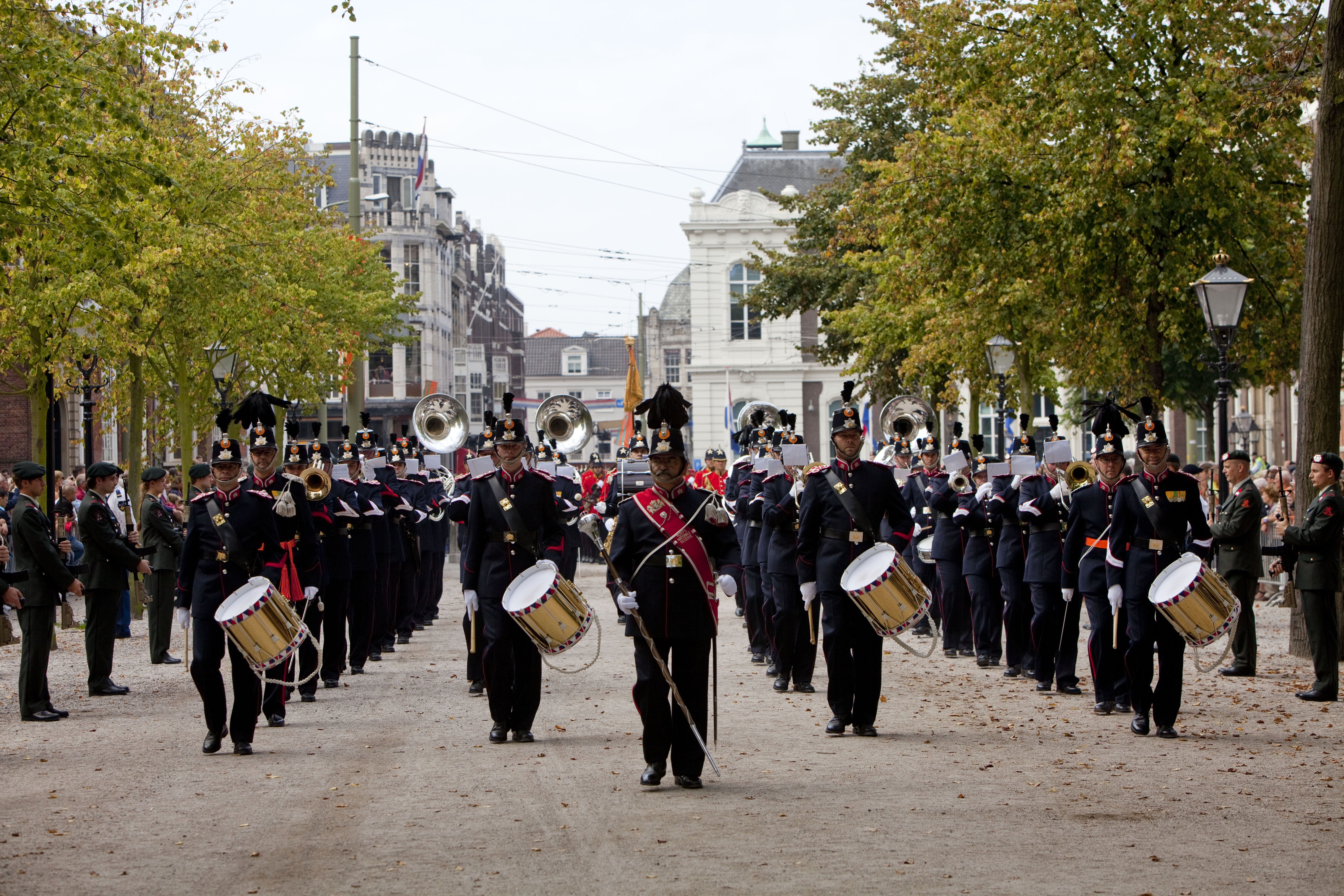 De FKNR op het Lange Voorhout, Den Haag tijdens Prinsjesdag 2014